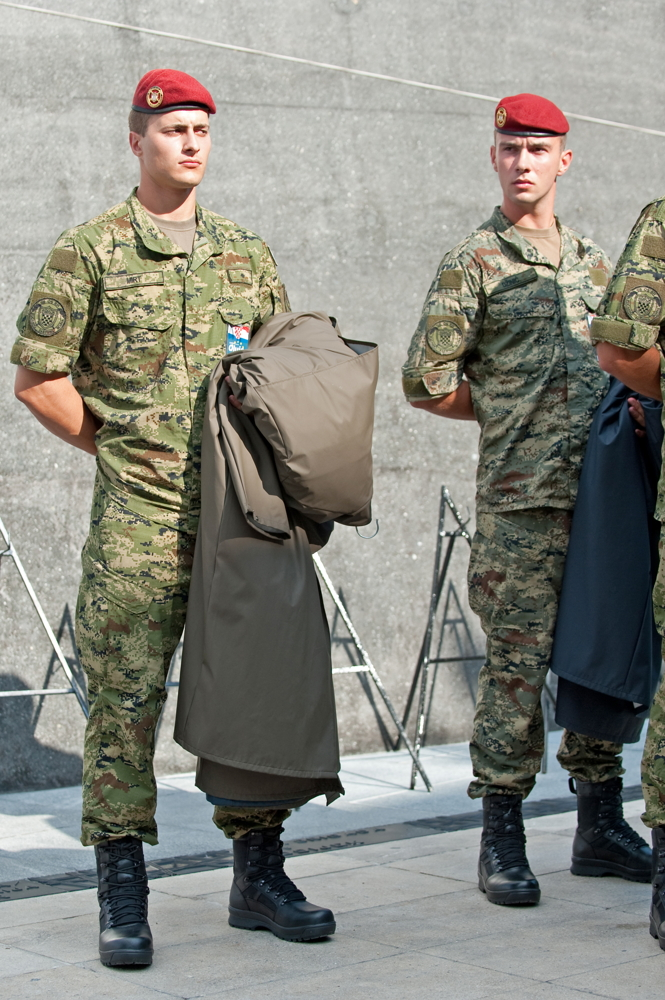 16. obljetnica vojnoredarstvene operacije Oluja u Kninu